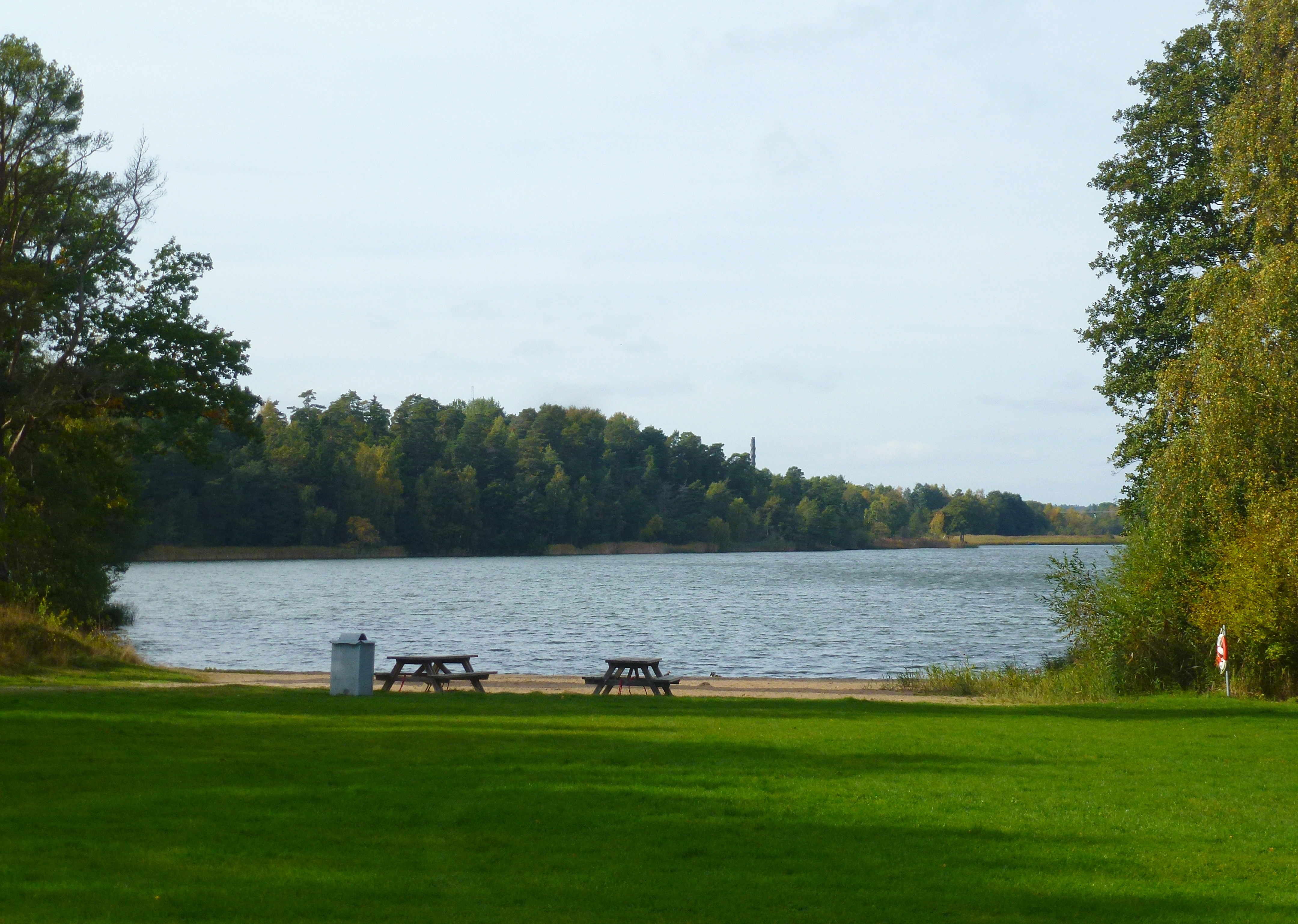 Älta Stensö badplats